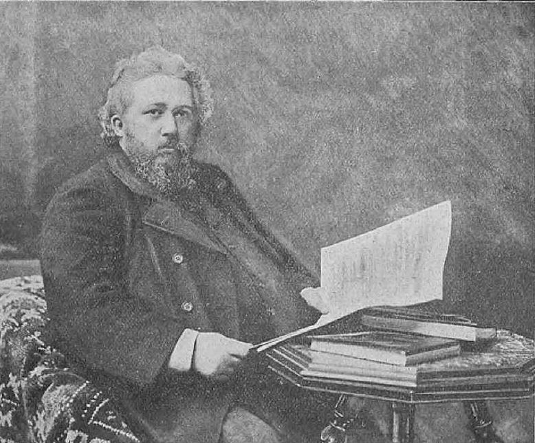 Jan Gall (-1901)